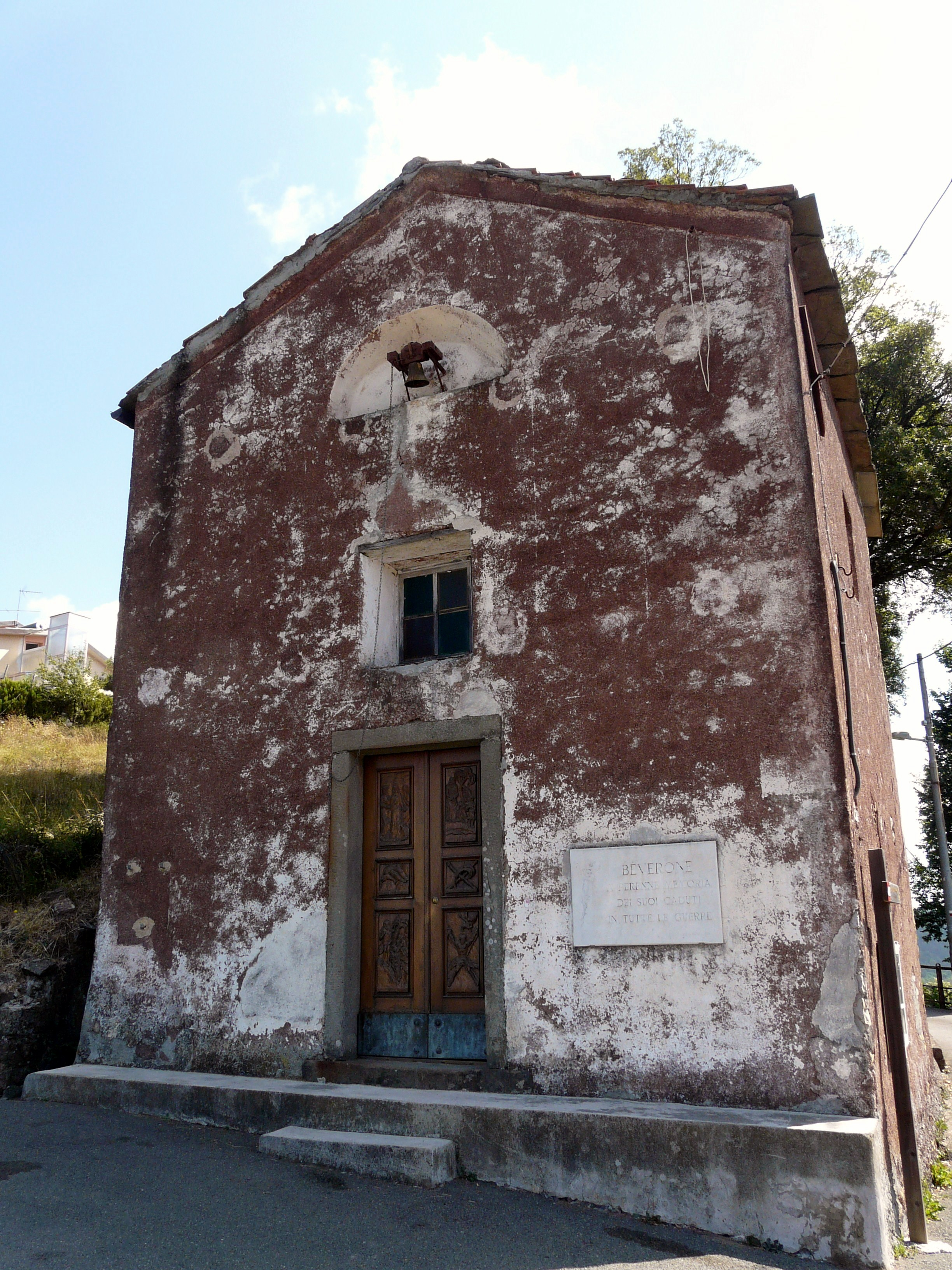 Oratorio di Sant'Andrea, Beverone, Rocchetta di Vara, Liguria, Italia